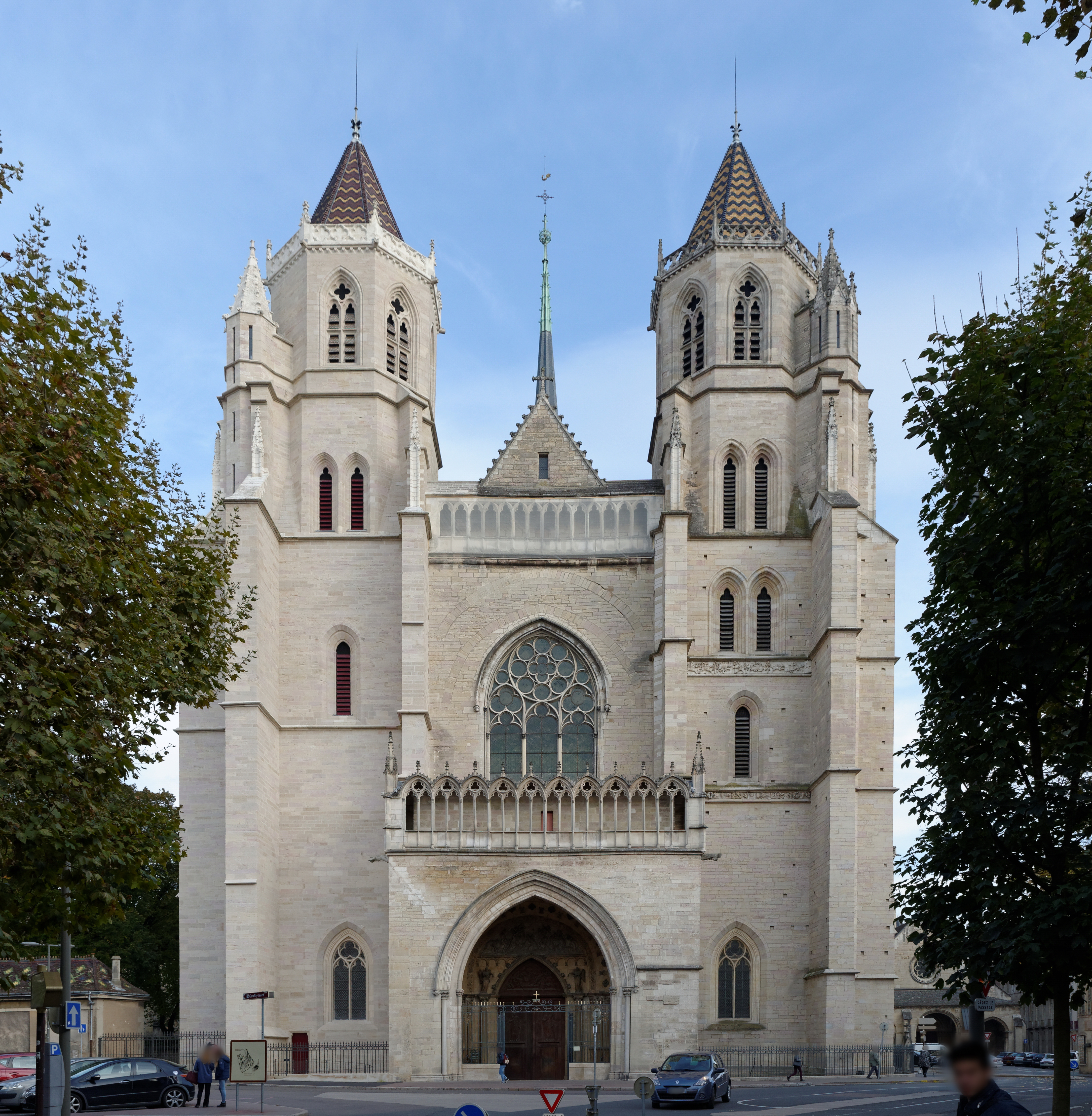 Cathédrale Saint-Bénigne, à Dijon (Côte d'Or, Bourgogne, France).